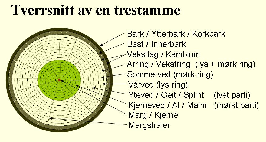 Tverrsnitt av en trestamme